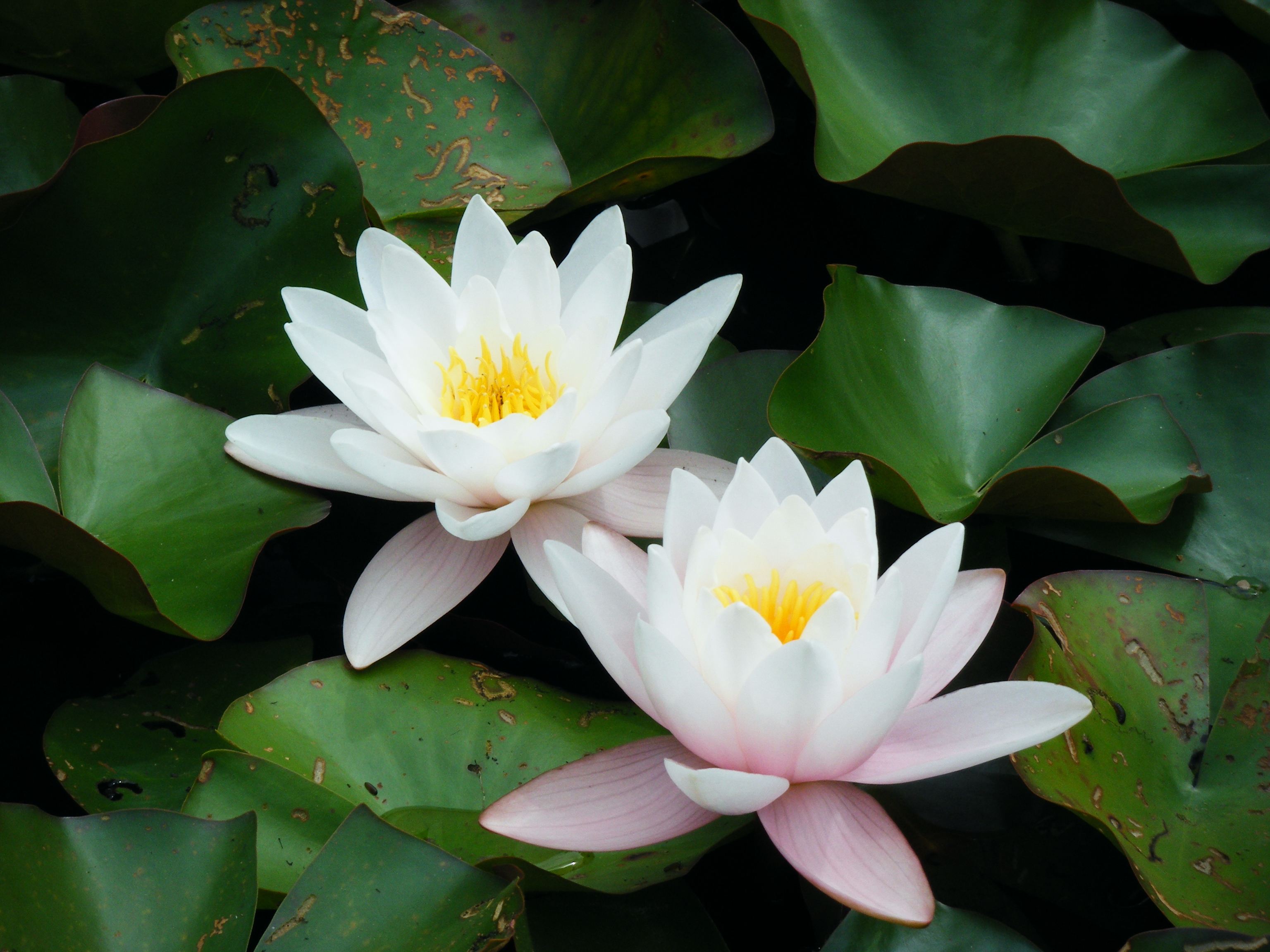 2 fleurs de lotus